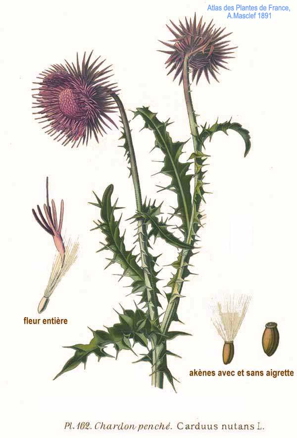 Carduus nutans L.